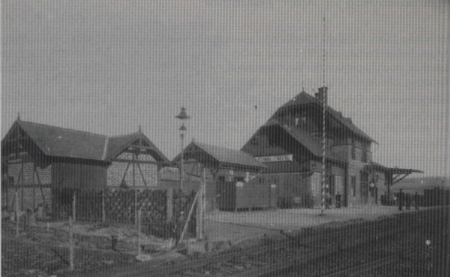 Bahnhof in Schmallenberg im Jahr 1890, Deutschland.